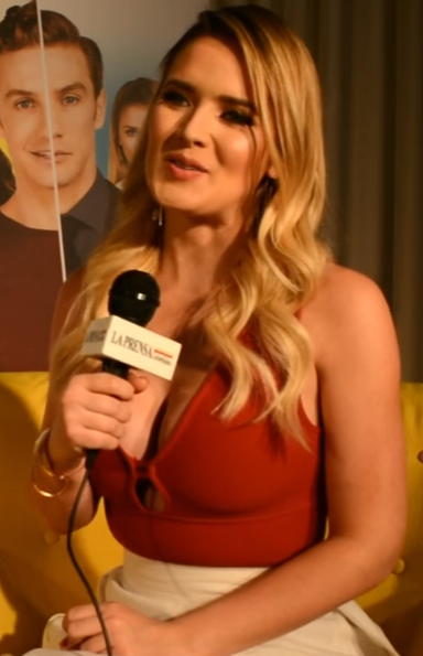 Kimberly Dos Ramos en Quien es Quien